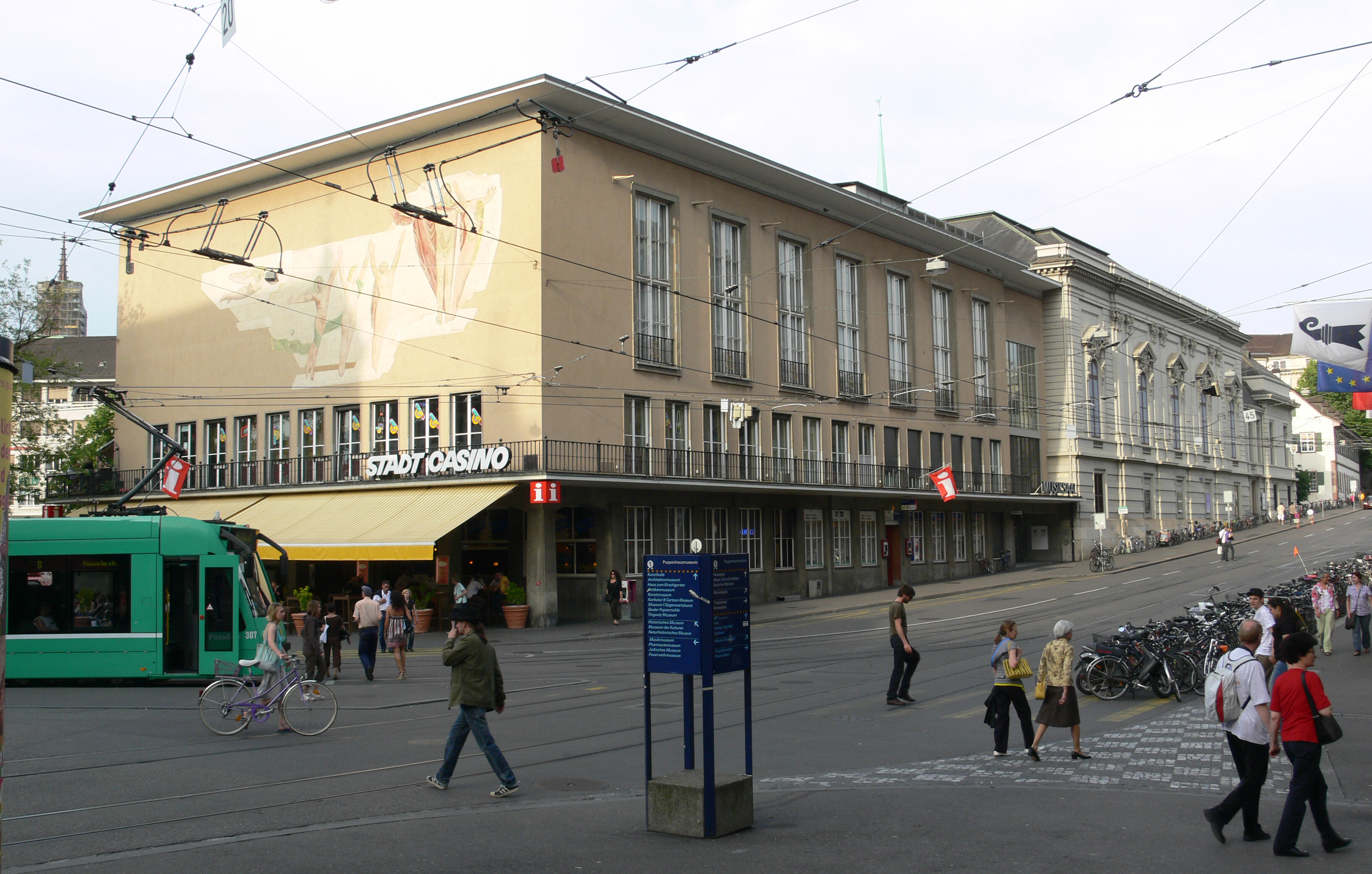 Stadtcasino Basel am Steinenberg, Basel